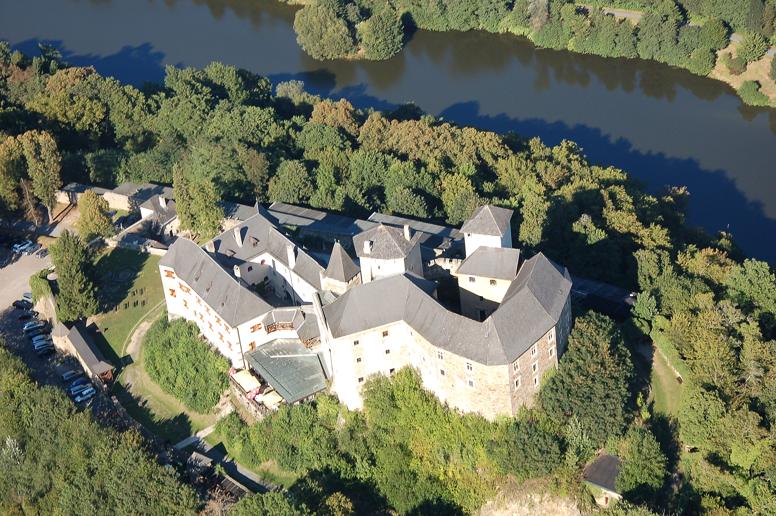 Burg Lockenhaus